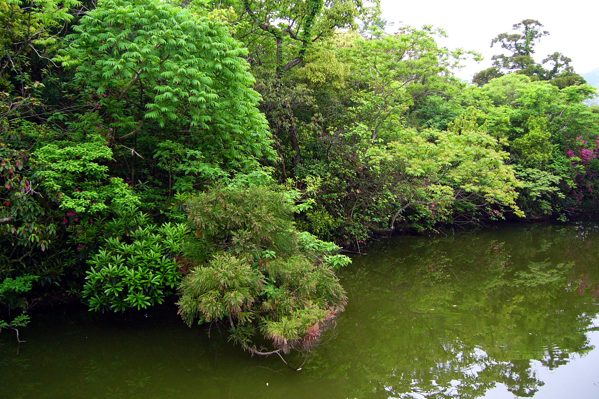 Ukishima-no-mori in Shingu, Wakayama Prefecture